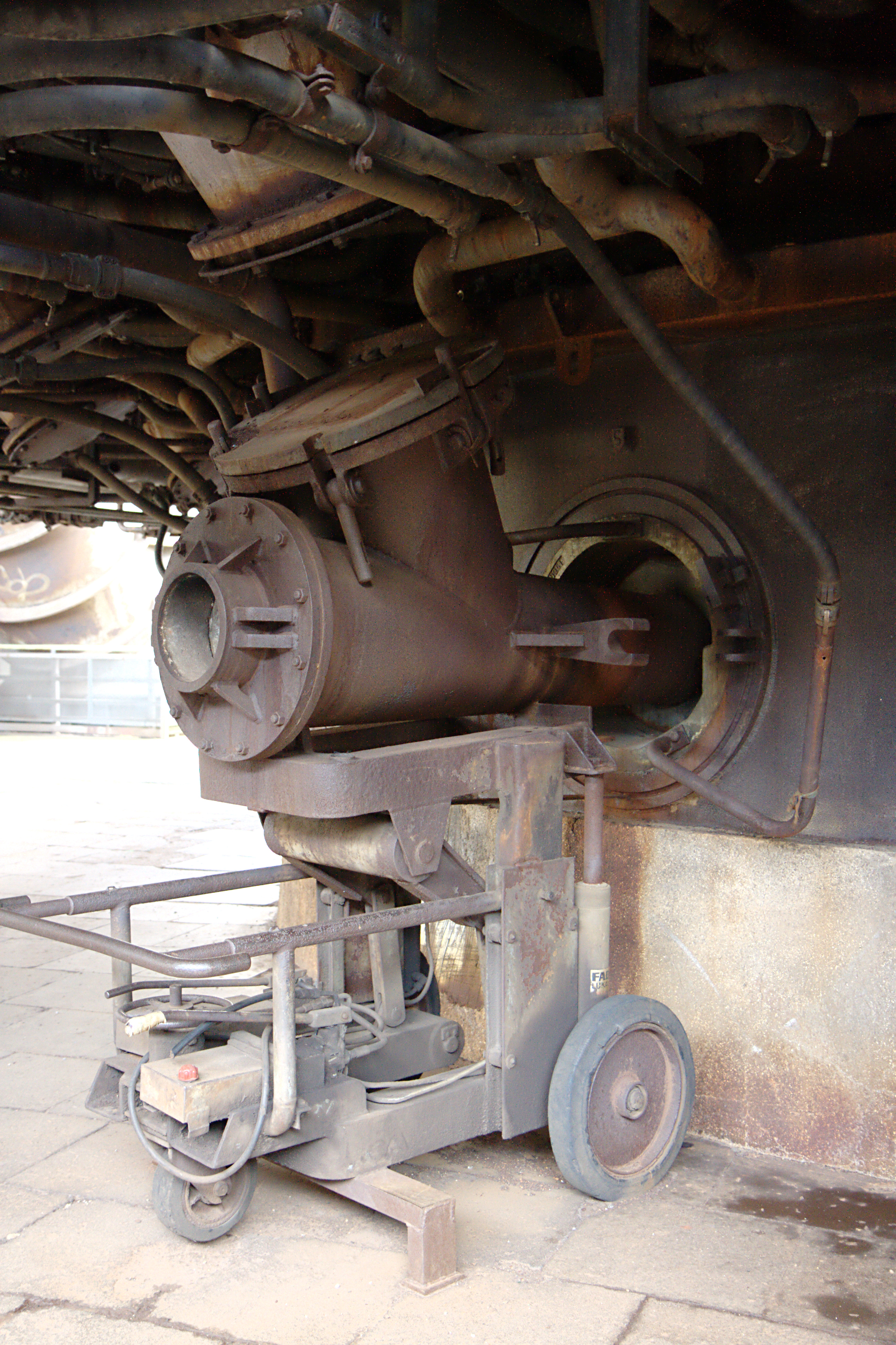 Фурмений рукав і візок для його монтажу й заміни.